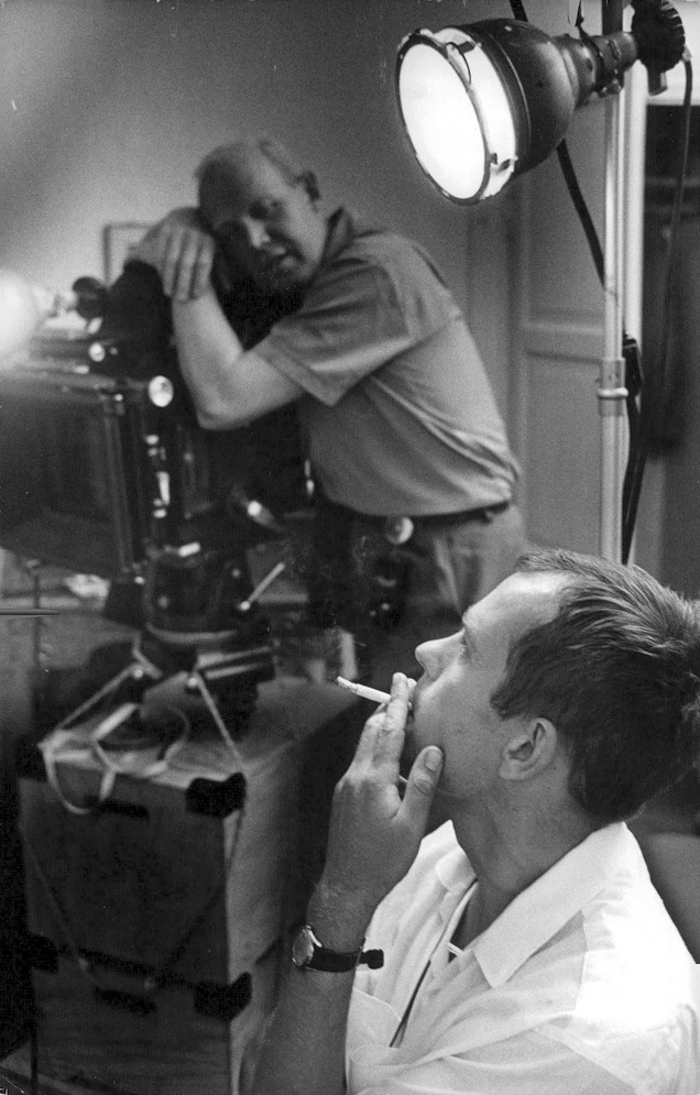 Jörn Donners nya film "Tvärbalk". Donner i förgrunden med fotografen Rune Ericson i bakgrunden.